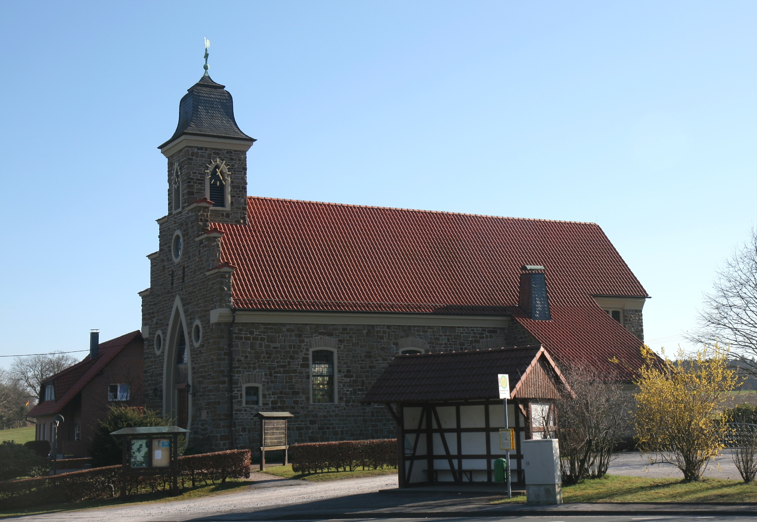 Katholische Kirche (Kapelle) St. Aloysius in Menden (Sauerland)-Oesbern.